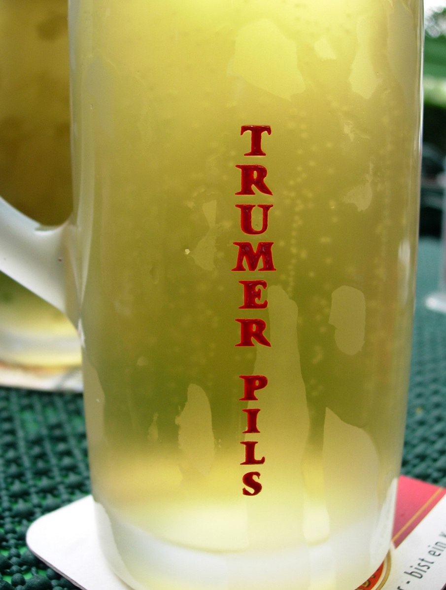 Bécs 334